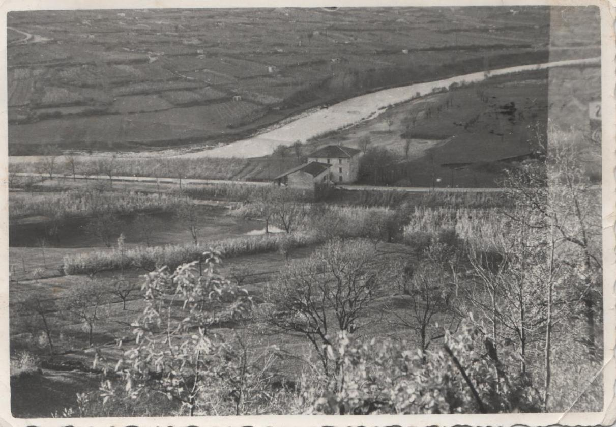 XIX secolo, Località Giarelli e Campagnelli. Nadro, Val Camonica